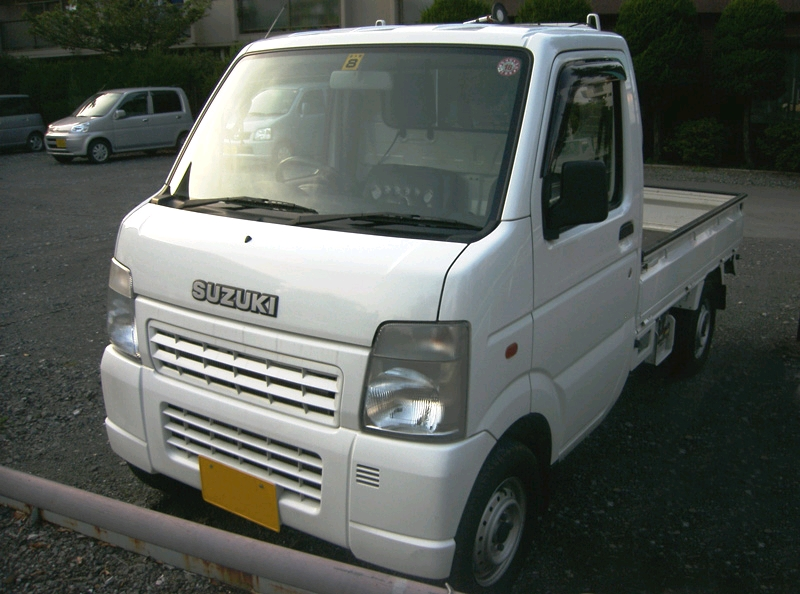 “Suzuki Carry”_2005 Image:Suzuki_Carry_2005_b.jpg